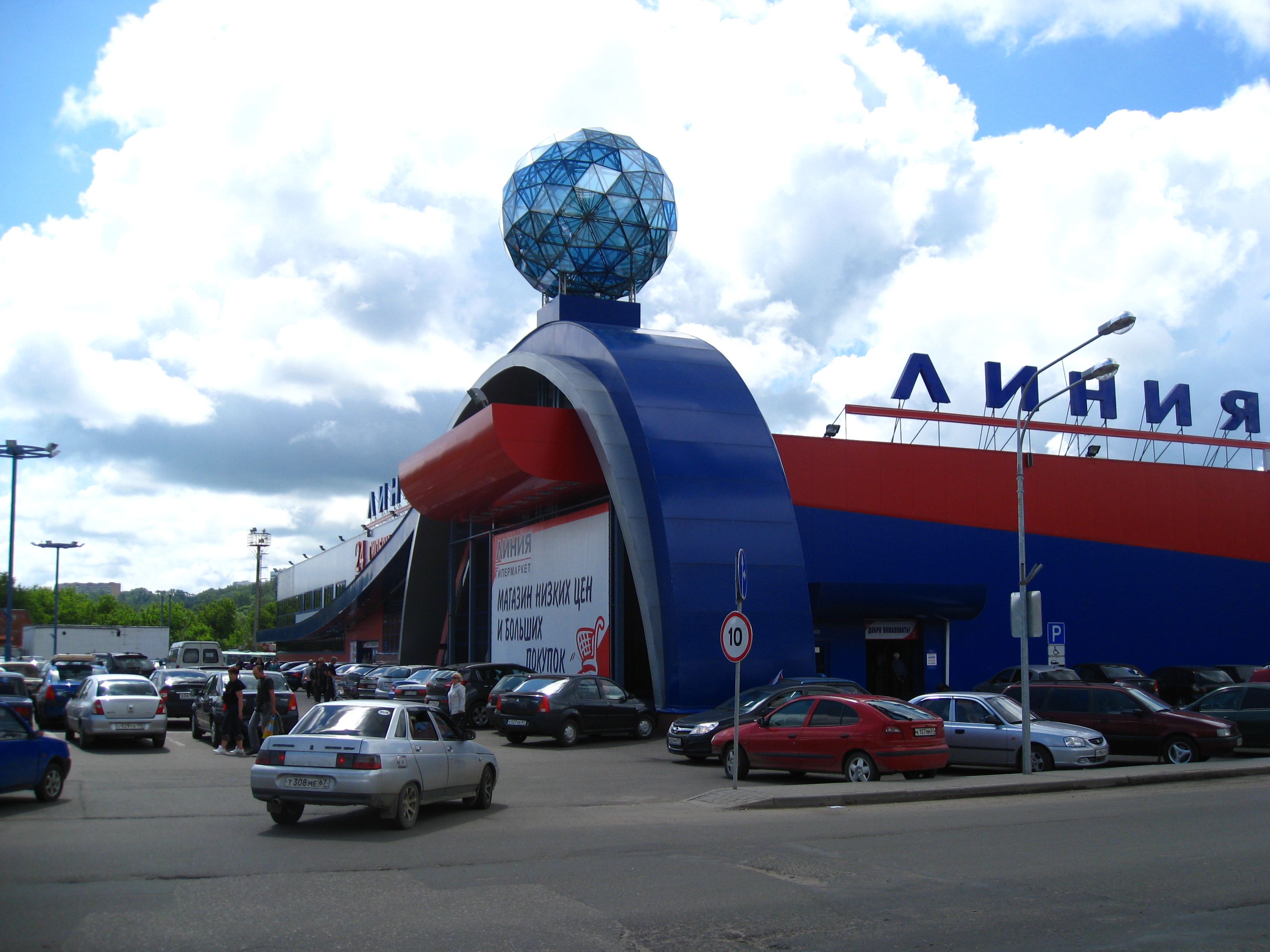 Гипермаркет "Линия" в Смоленске - большой торговый центр